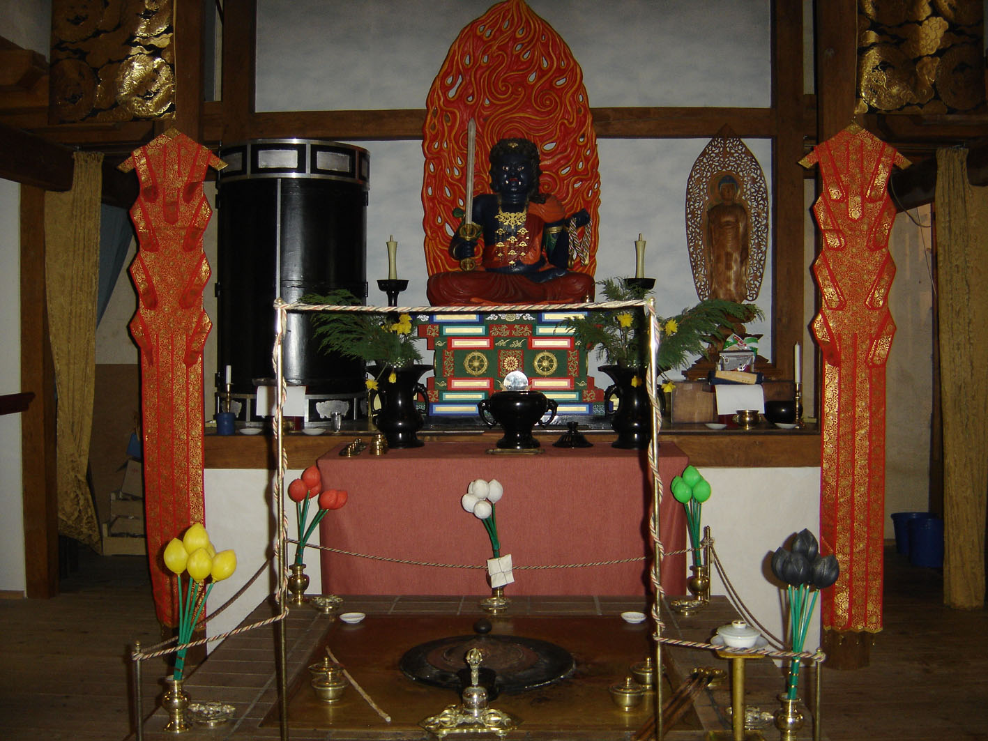 temple mikkyo